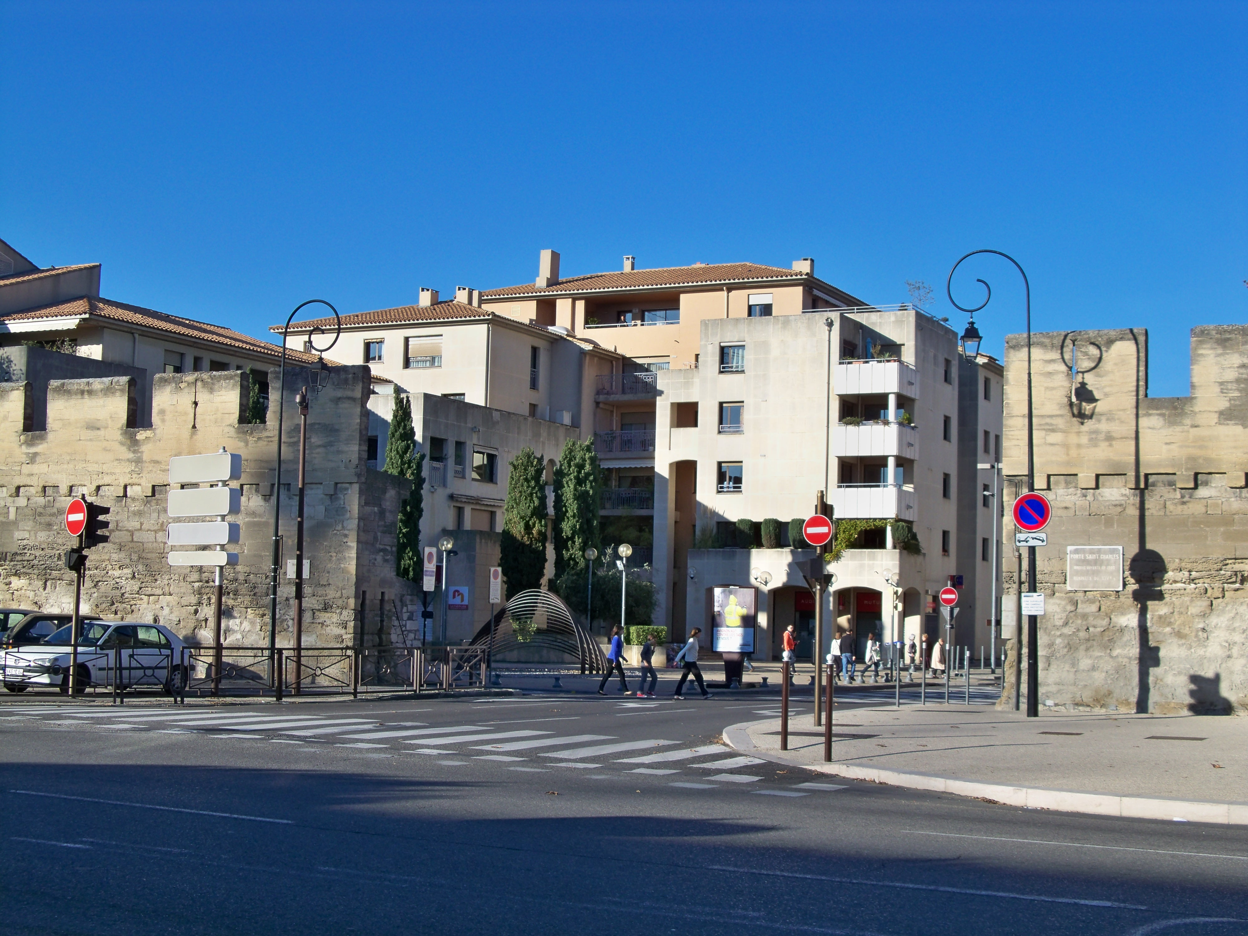 Porte Saint Charles à Avignon, Vaucluse, France